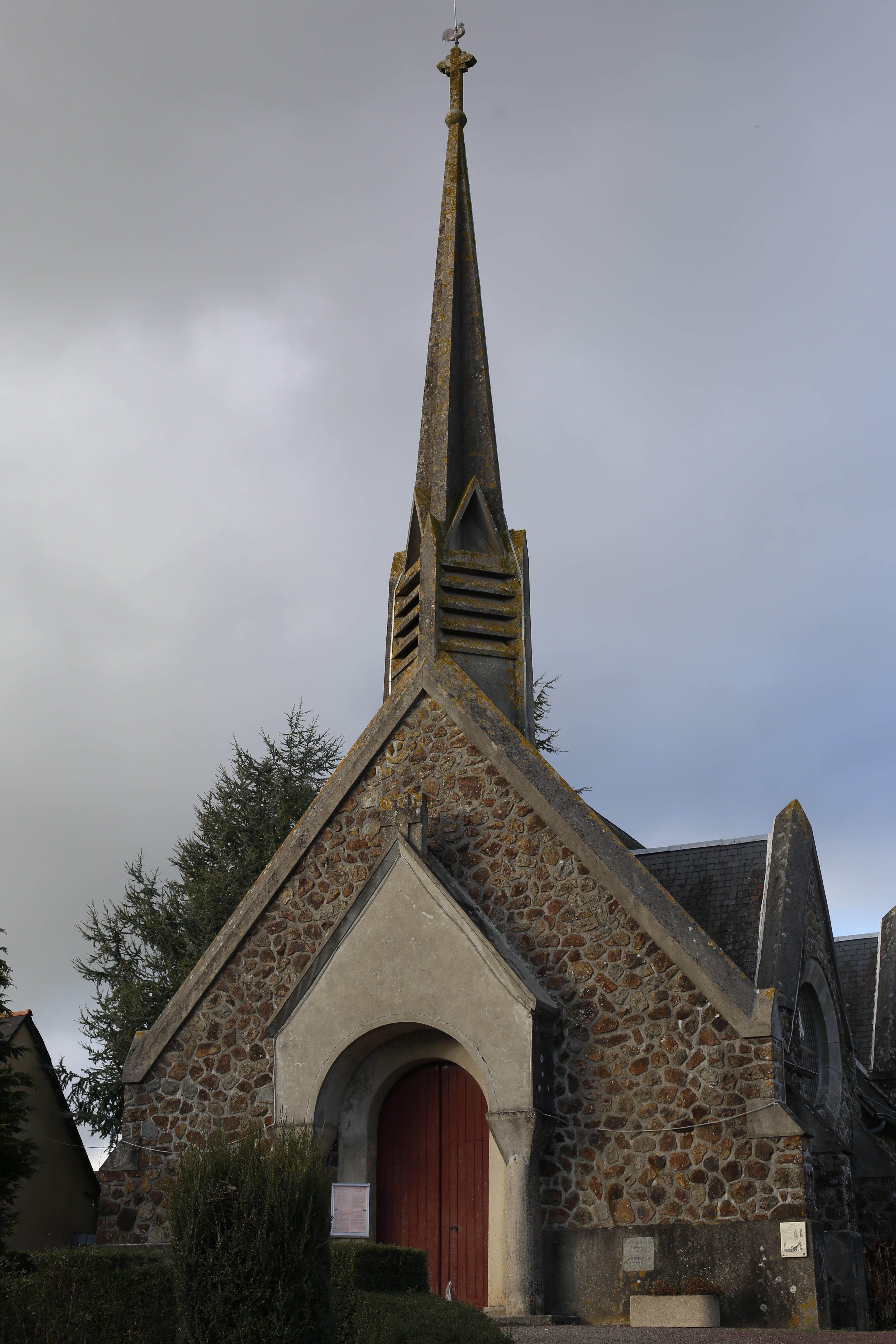 Église Saint-Mervon de Saint-M'Hervon.